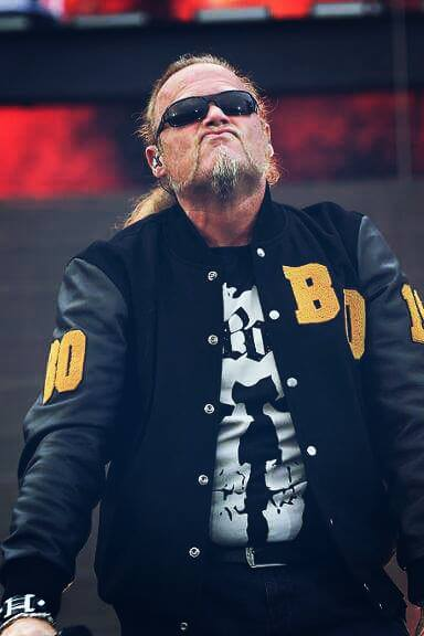 Kevin Richard Russell auf dem Hockenheimring 2015 mit den Böhsen Onkelz